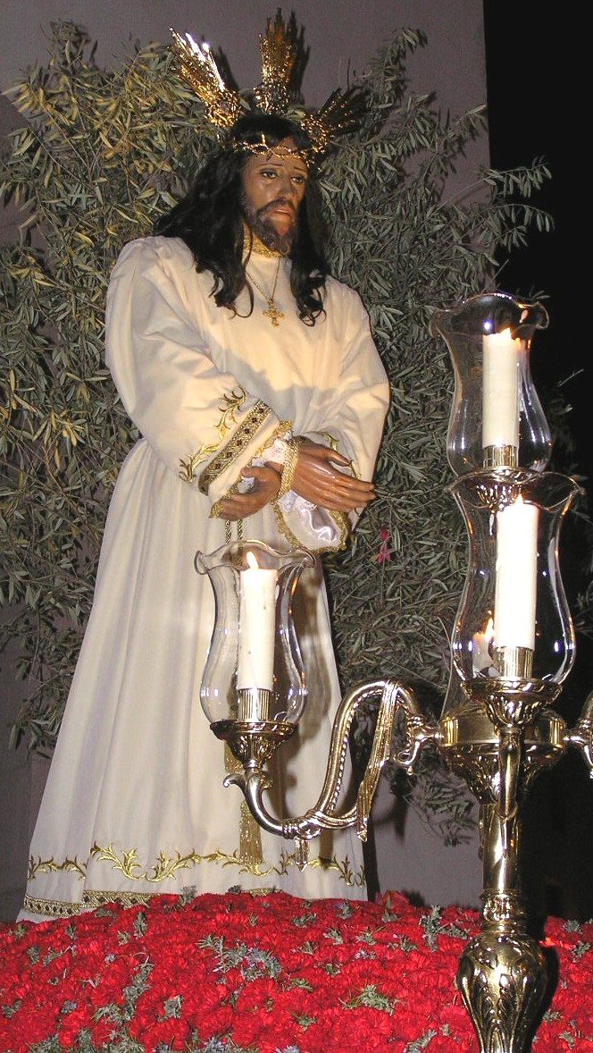 Procesión de Nuestro padre Jesús Preso, el Jueves Santo